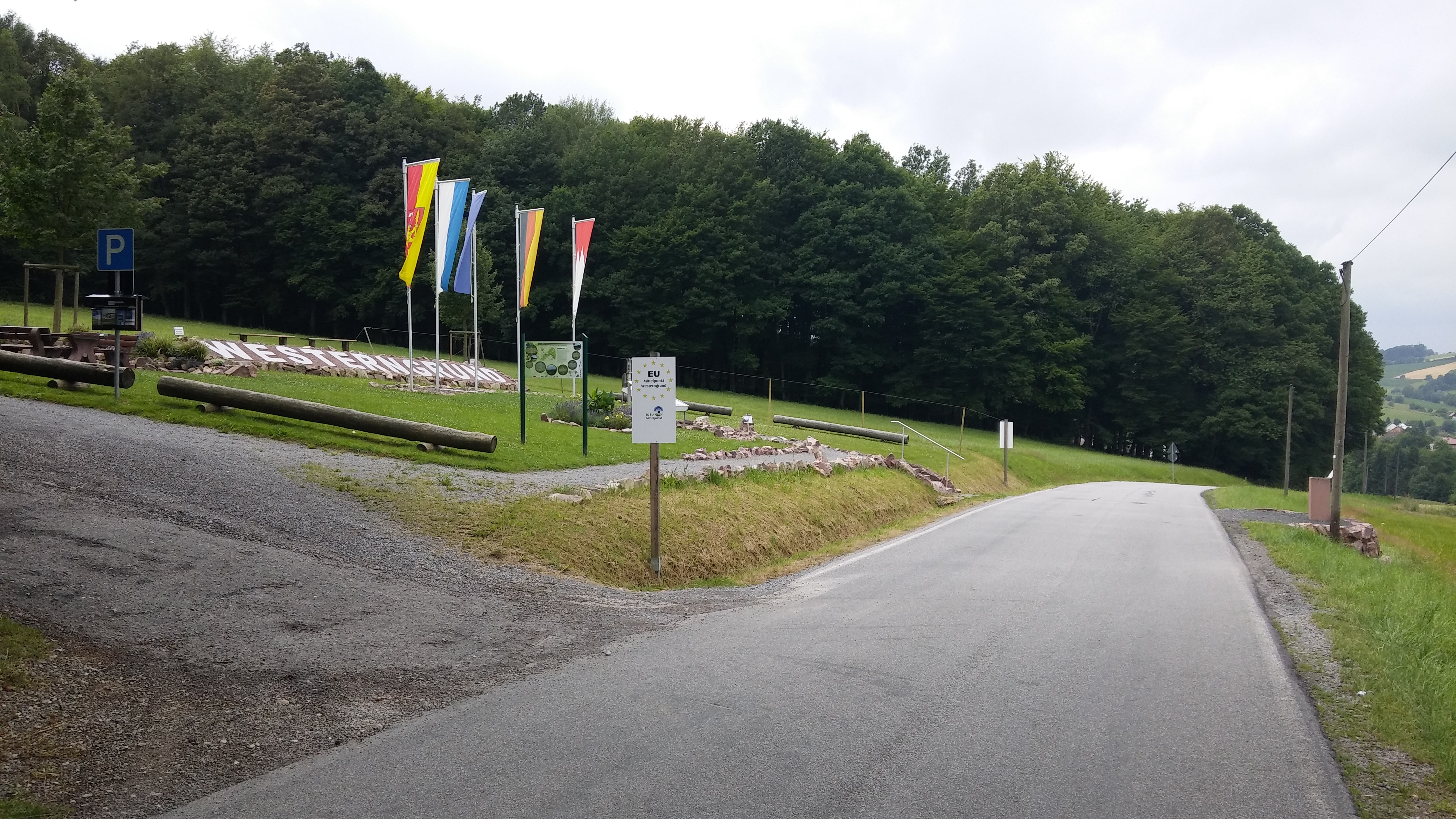 Übersichtsfoto des Europäischen Mittelpunktes vor Brexit